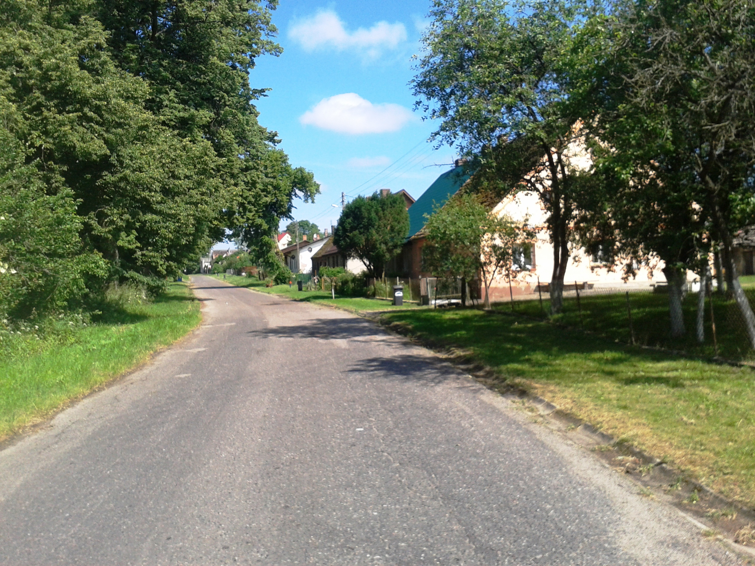 Sosnowo - wieś w gminie Resko